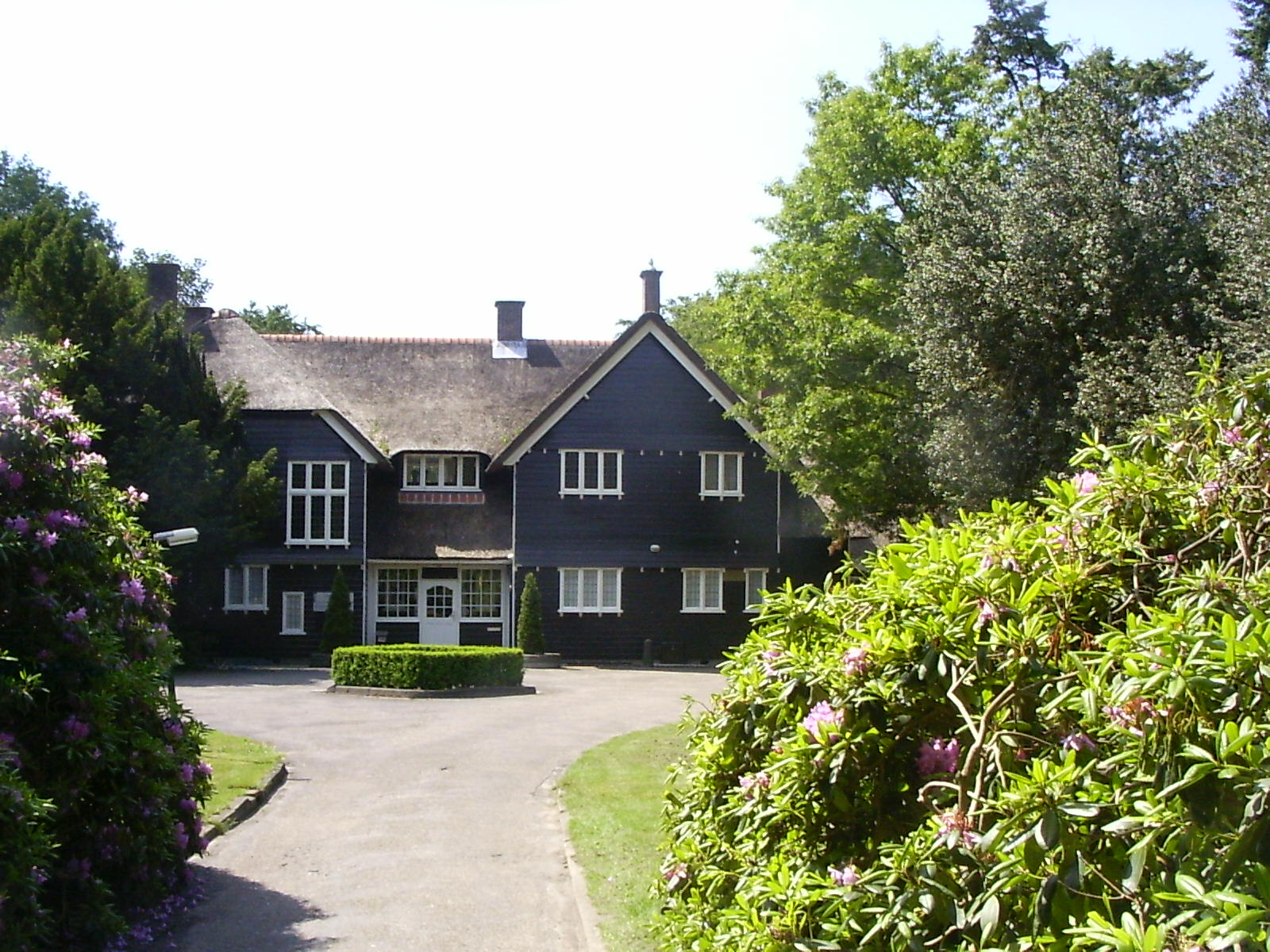 Villa Sanatorium Zonnestraal